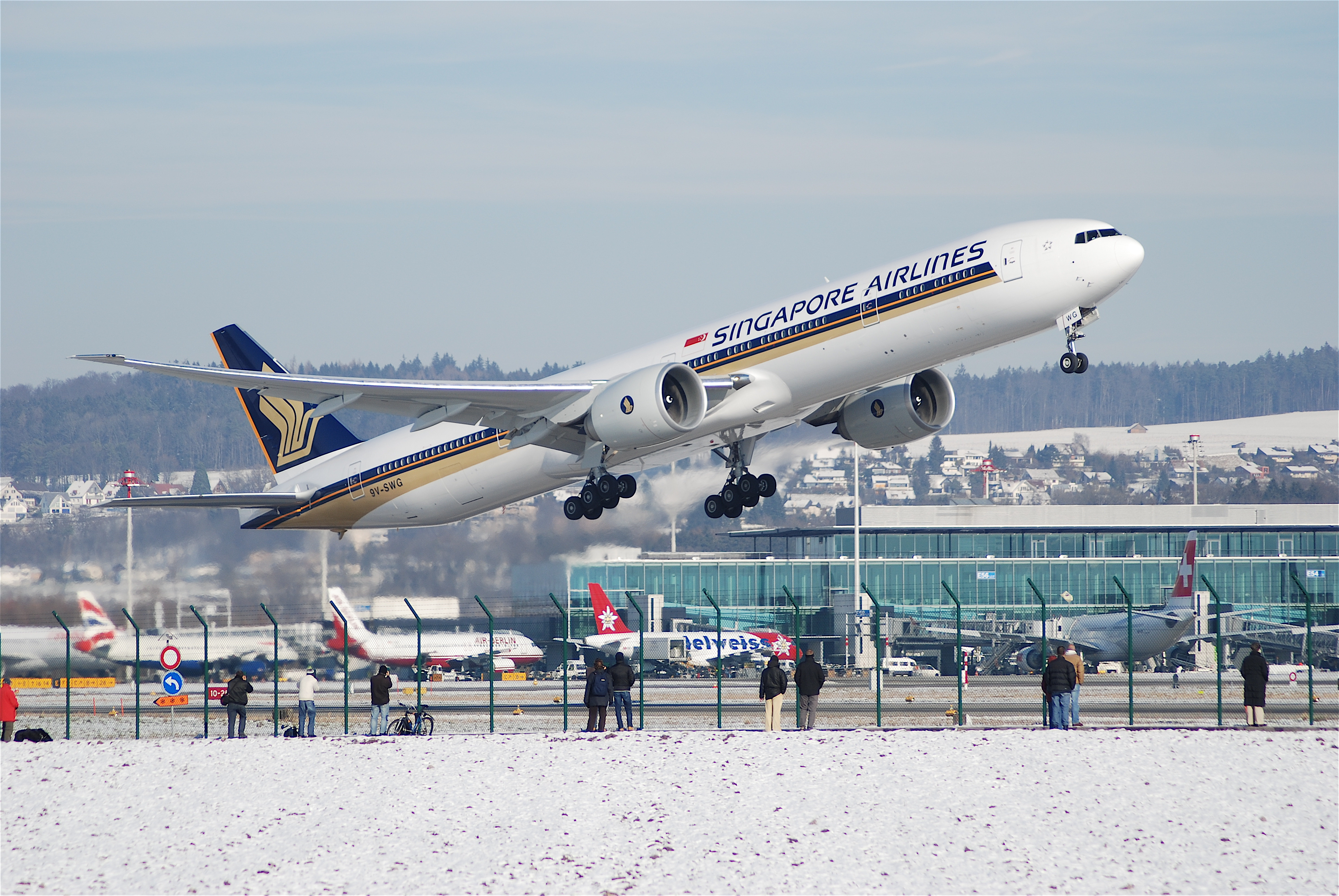 Singapore Airlines Boeing 777-300; 9V-SWG@ZRH;28.01.2007/449bm